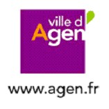 Logo de la ville